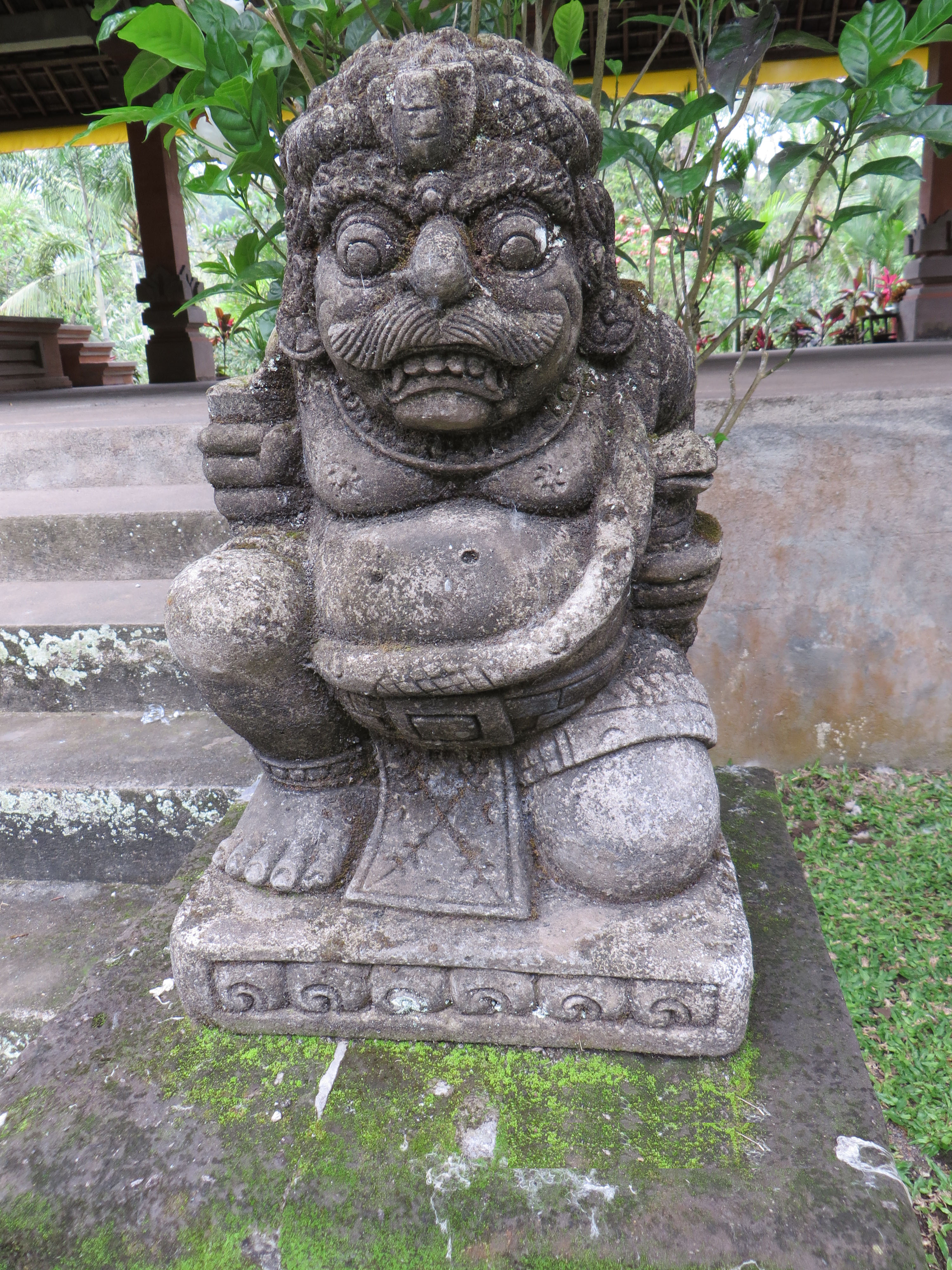 Patung di area Goa Gajah